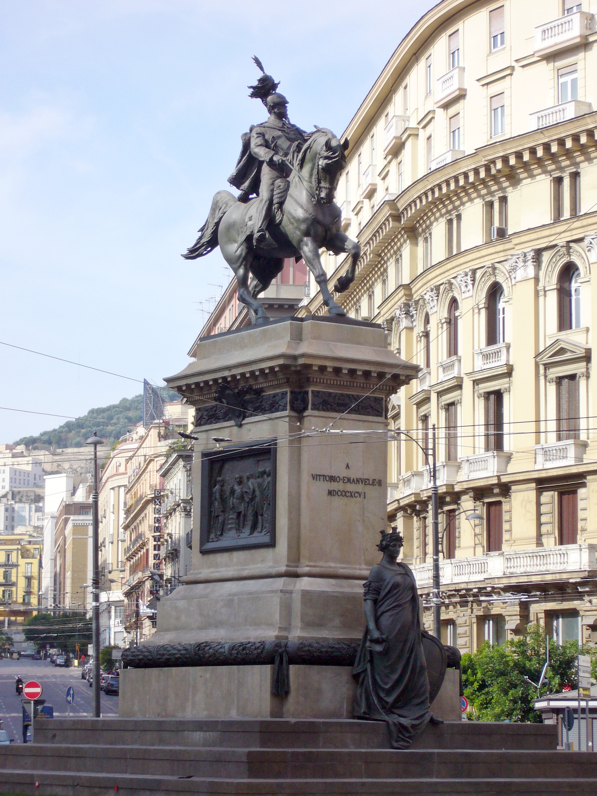 Monumento a Vittorio Emanuele II di Tommaso Solari (scene basamento) e Alfonso Balzico (statua equestre) su disegno di Emilio Franceschi